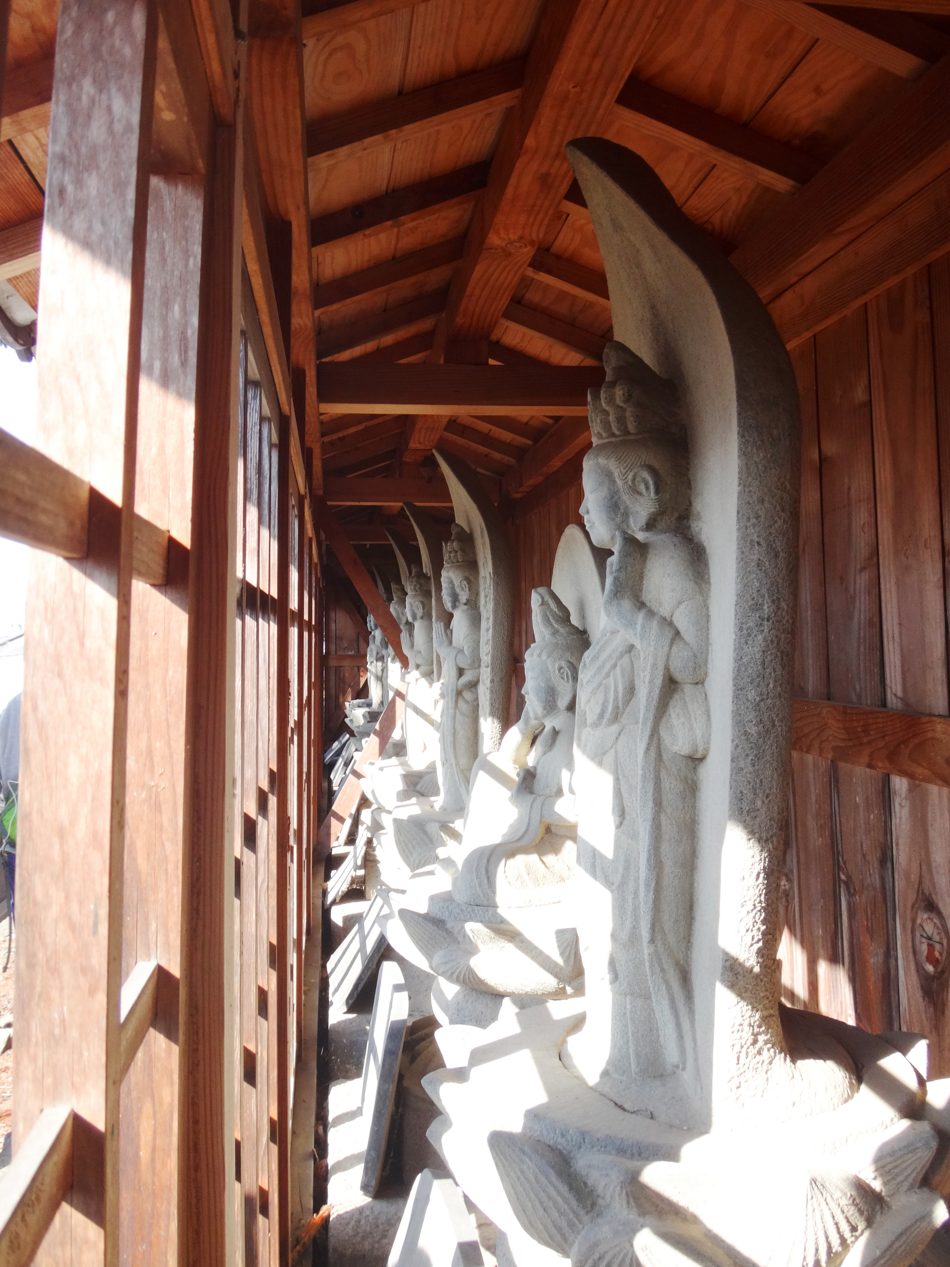 kenpuku-ji